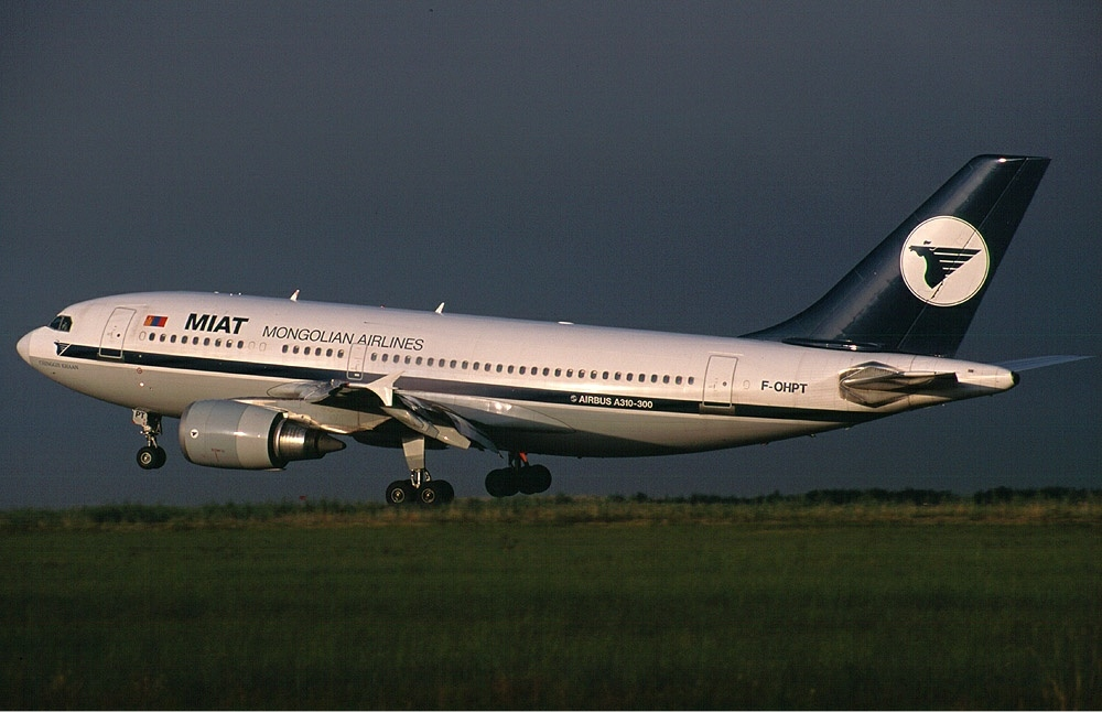 MIAT Airbus A310-304 at Ulanbaataar Airport